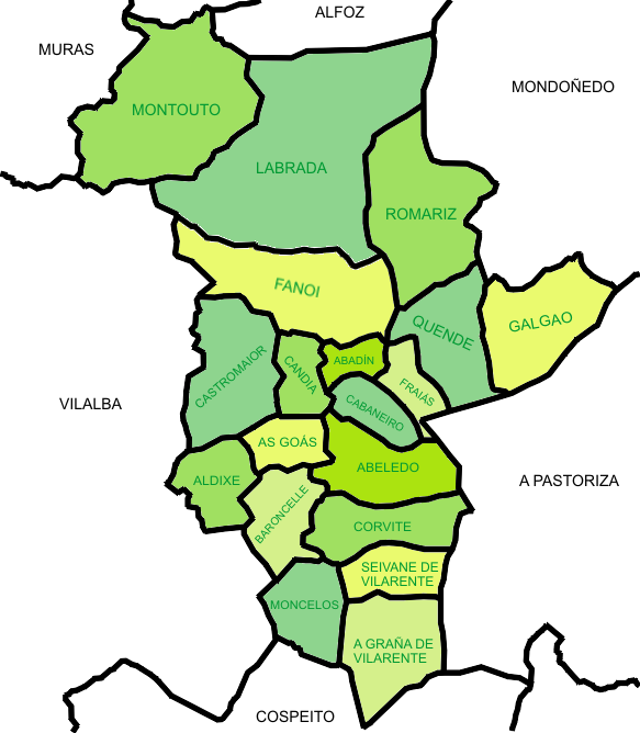 Parroquias do concello de Abadín